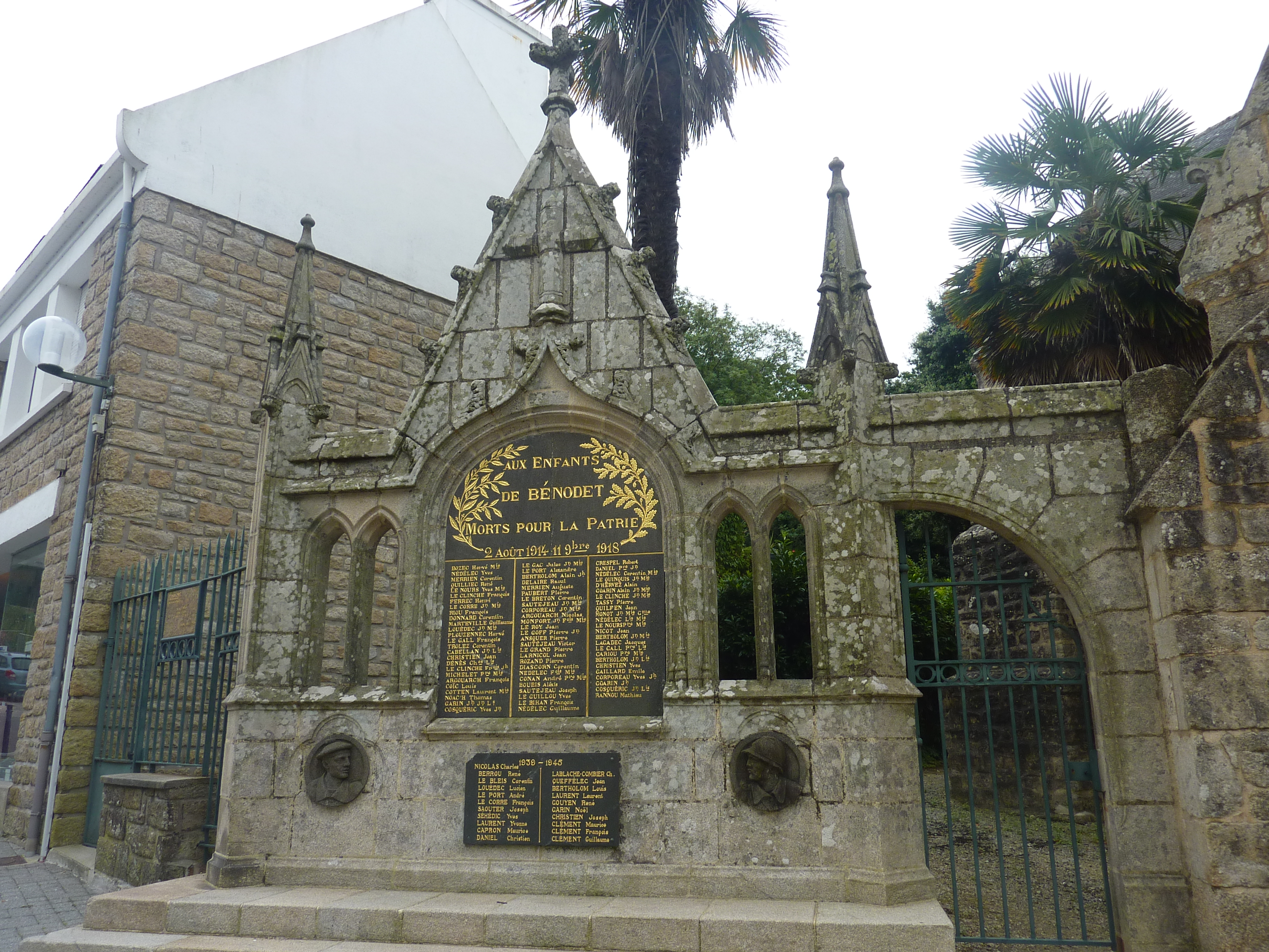 Bénodet : le monument aux morts